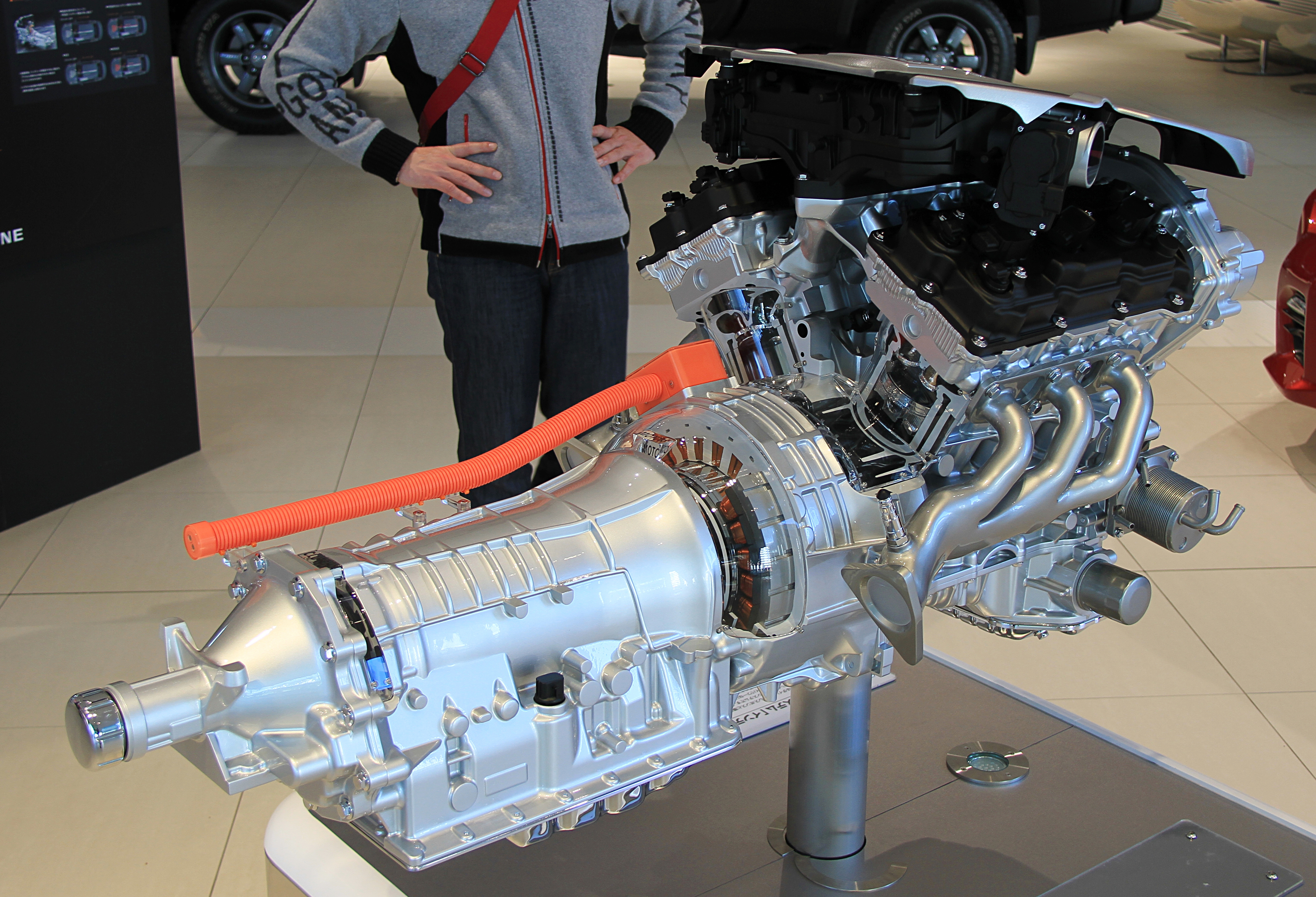 Nissan Skyline